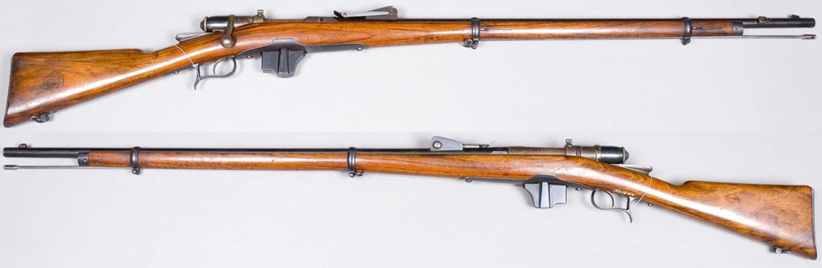 Italijanska puška Vetterli-Vitali Modela 1870/87.